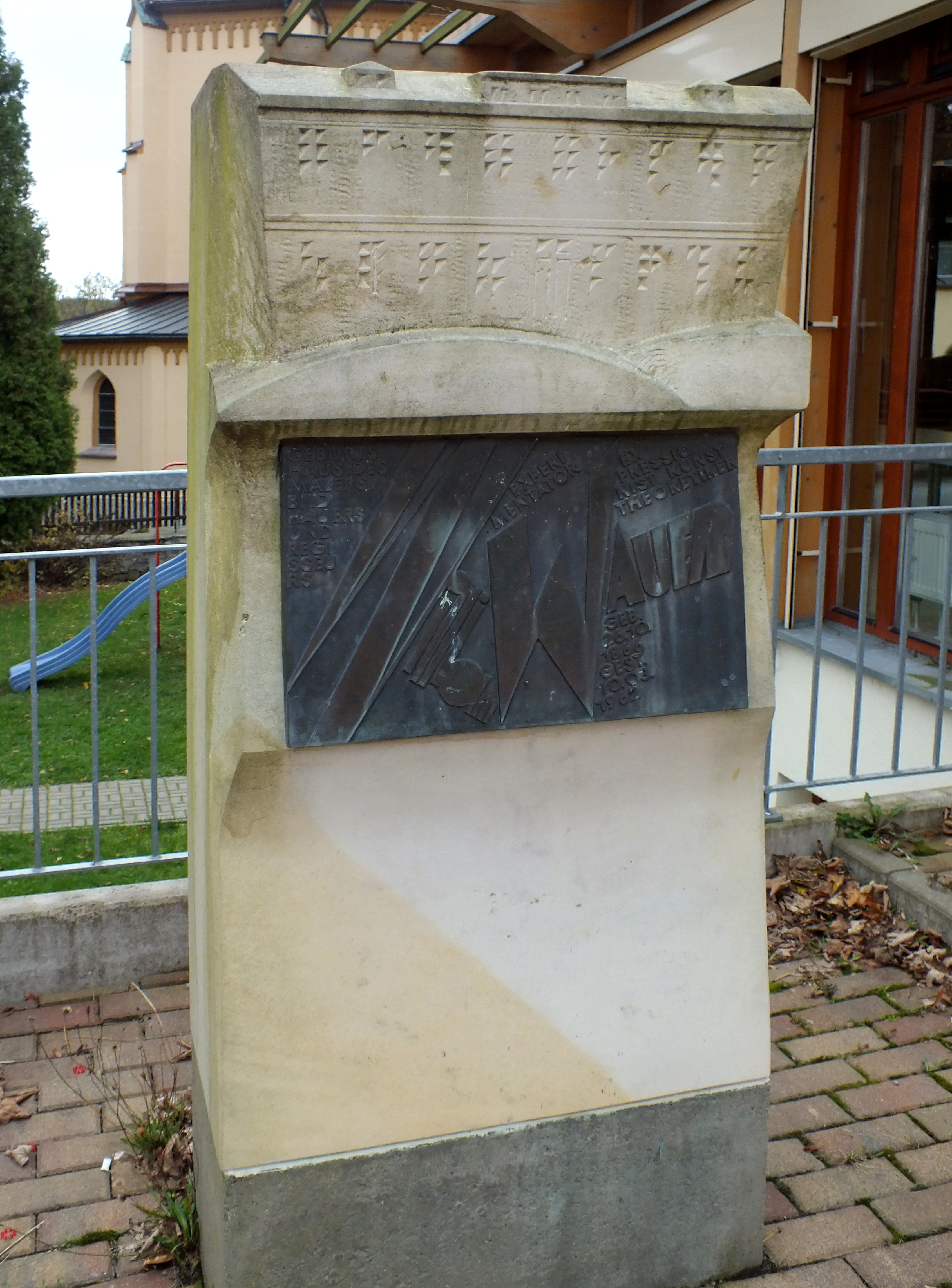 Oberwiesenthal